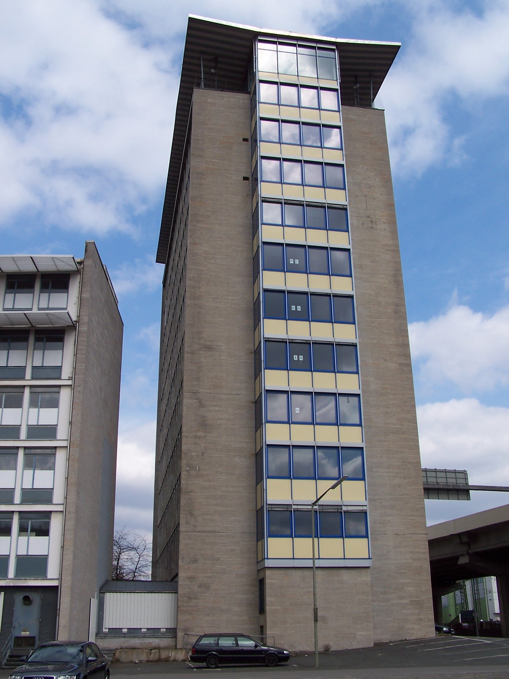 Das ehemalige Verwaltungsgebäude der Firma Thyssen-Krupp in Siegen-Geisweid wurde 2010 abgerissen.